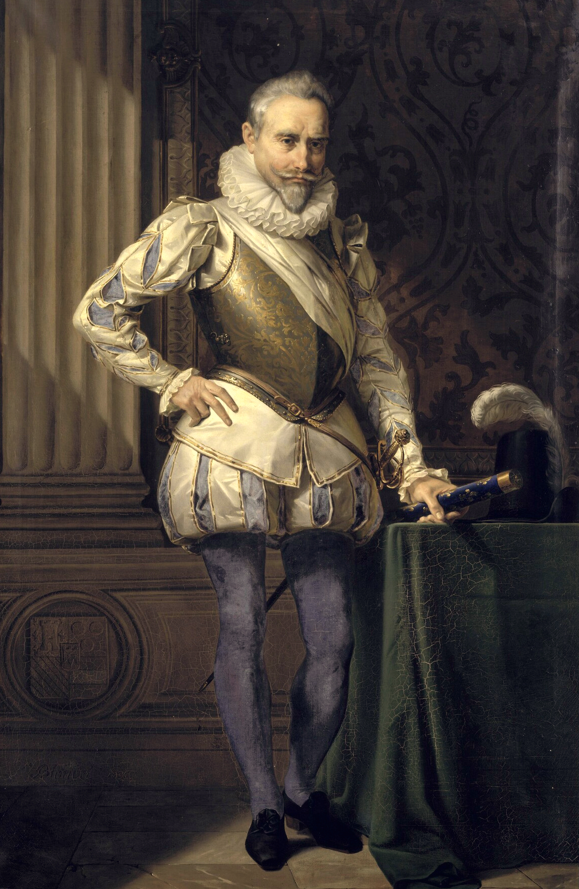 copie d'après un original conservé au château de Beauregard ; commandé par Louis-Philippe pour le musée historique de Versailles en 1834